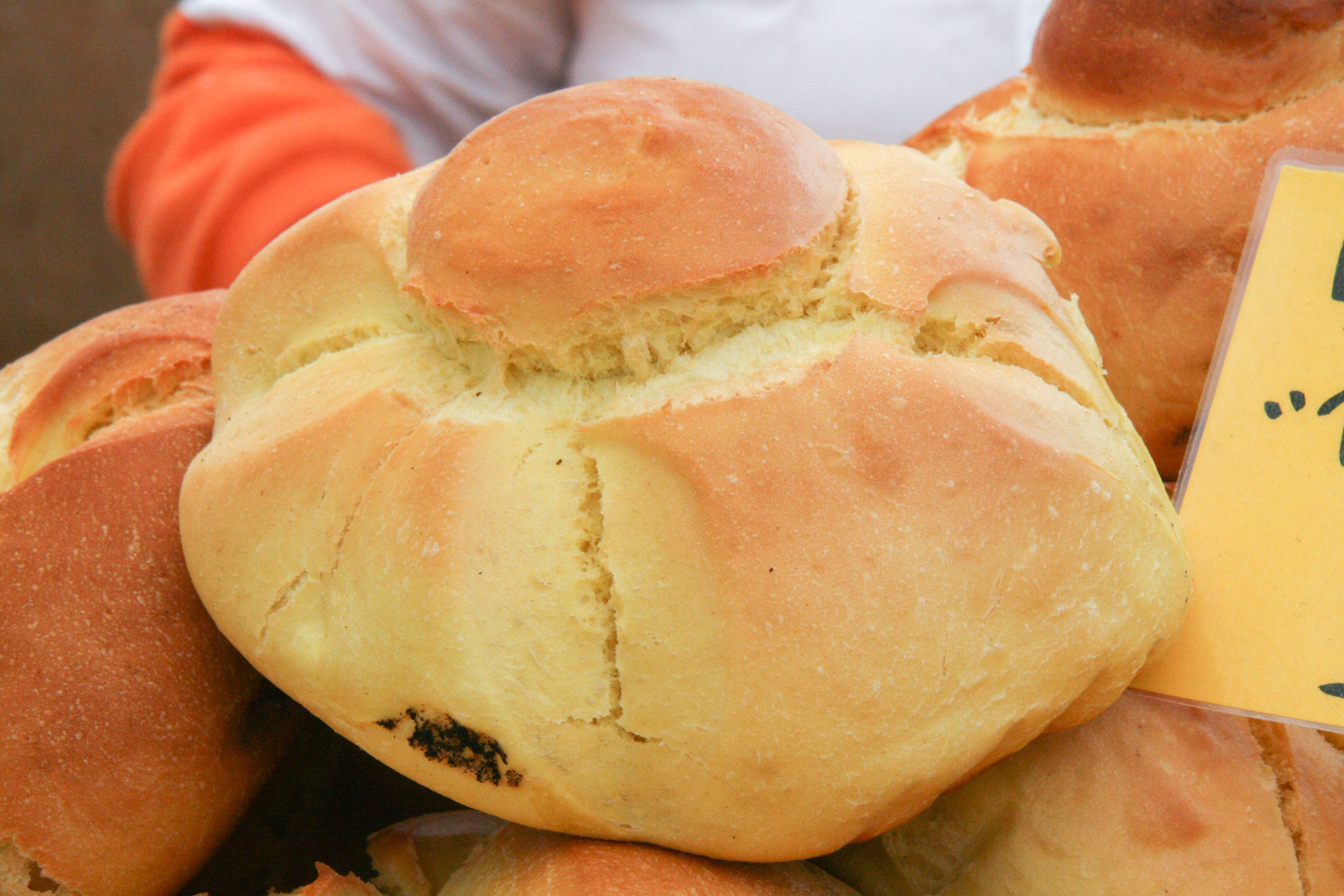 Pan dulce - Marrañuelas